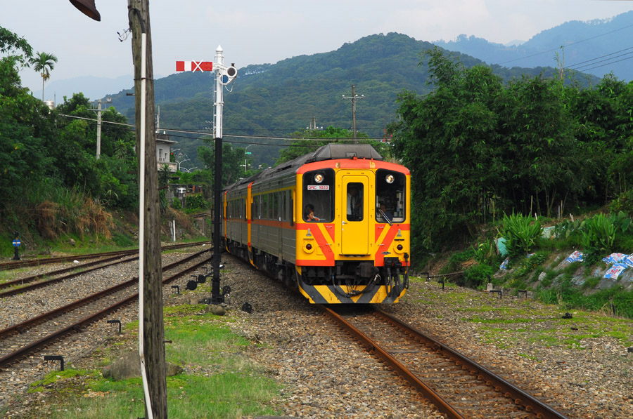 内湾方向から九讃頭駅に進入するDR1000型気動車。